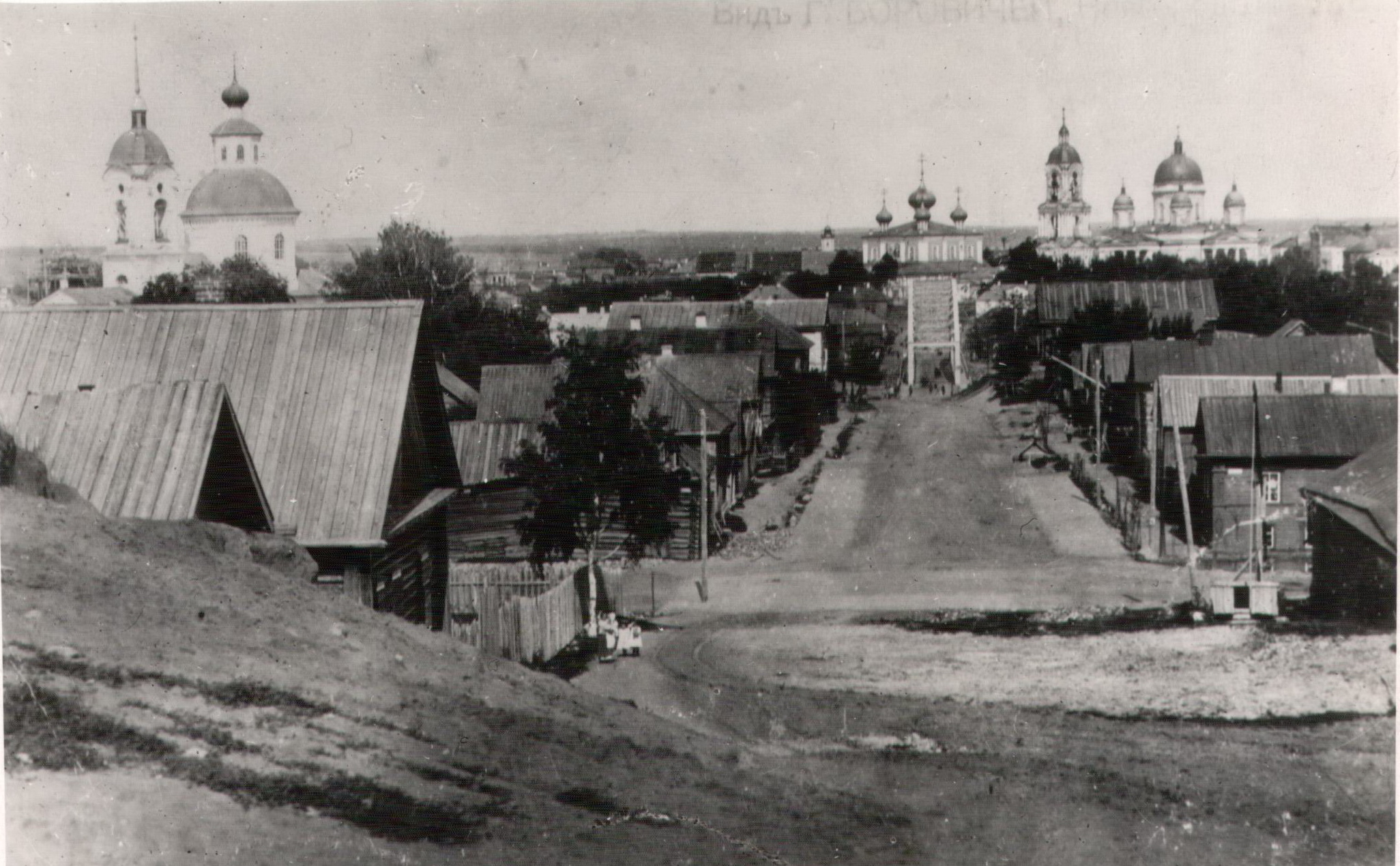 Вид на мост Белелюбского и Введенский соборе в его створе